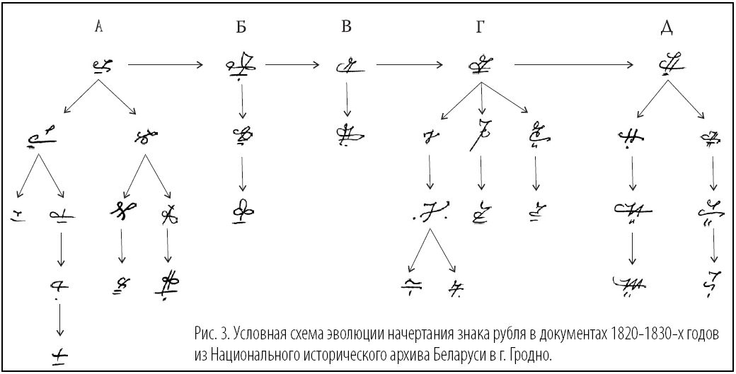 Условная схема эволюции и начертания знака рубля в документах 1820-1830 годов из Национального исторического архива Беларуси в г. Гродно